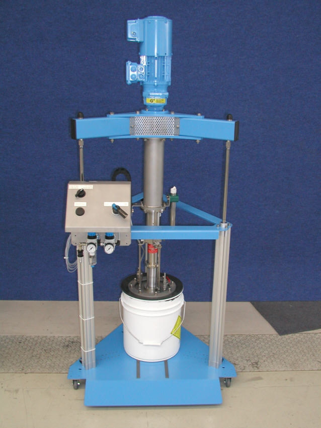 Hobbockentleerung